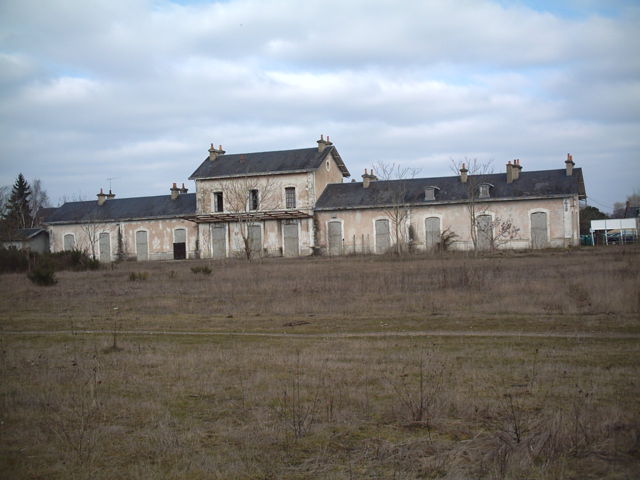 La gare de La Flèche vue des voies. (supprimées aujourd'hui)